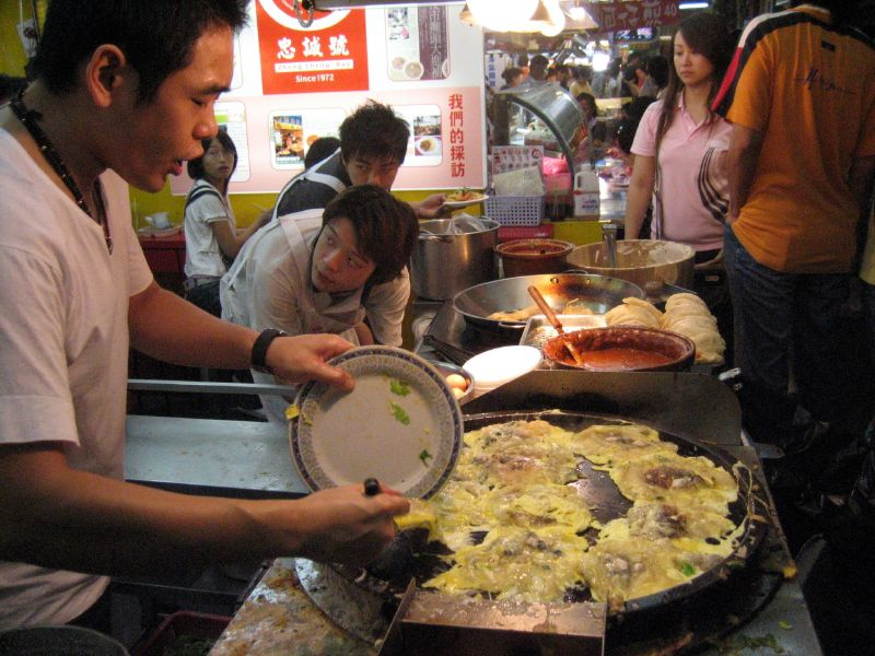 The Taiwanese night market staple: 蚵仔煎 (oyster omelette).士林夜市